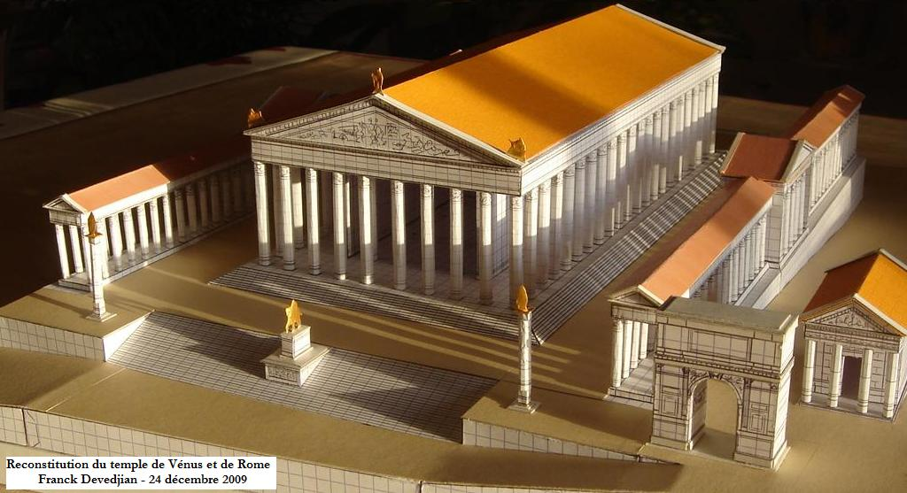 Description Reconstitution en papier du temple de Vénus et de Rome, situé à Rome Date24 December 2009SourceOwn work by the original uploaderAuthorFranck Devedjian, né le 12 août 1981 à Clamart (92) Reconstitution en papier du temple de Vénus et de Rome, situé à Rome